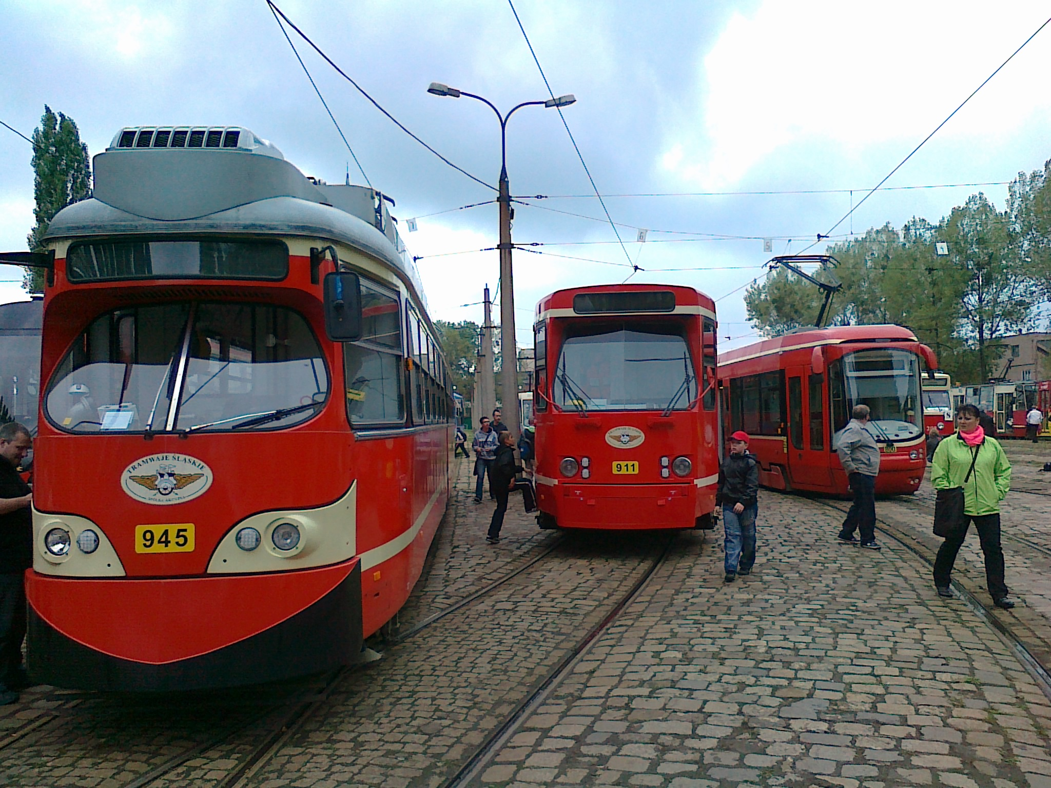 Dni otwarte Tramwajów Śląskich w zajezdni Stroszek w Bytomiu (2013-09-21)